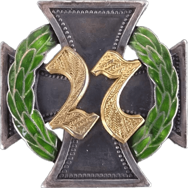 Jääkärimerkki